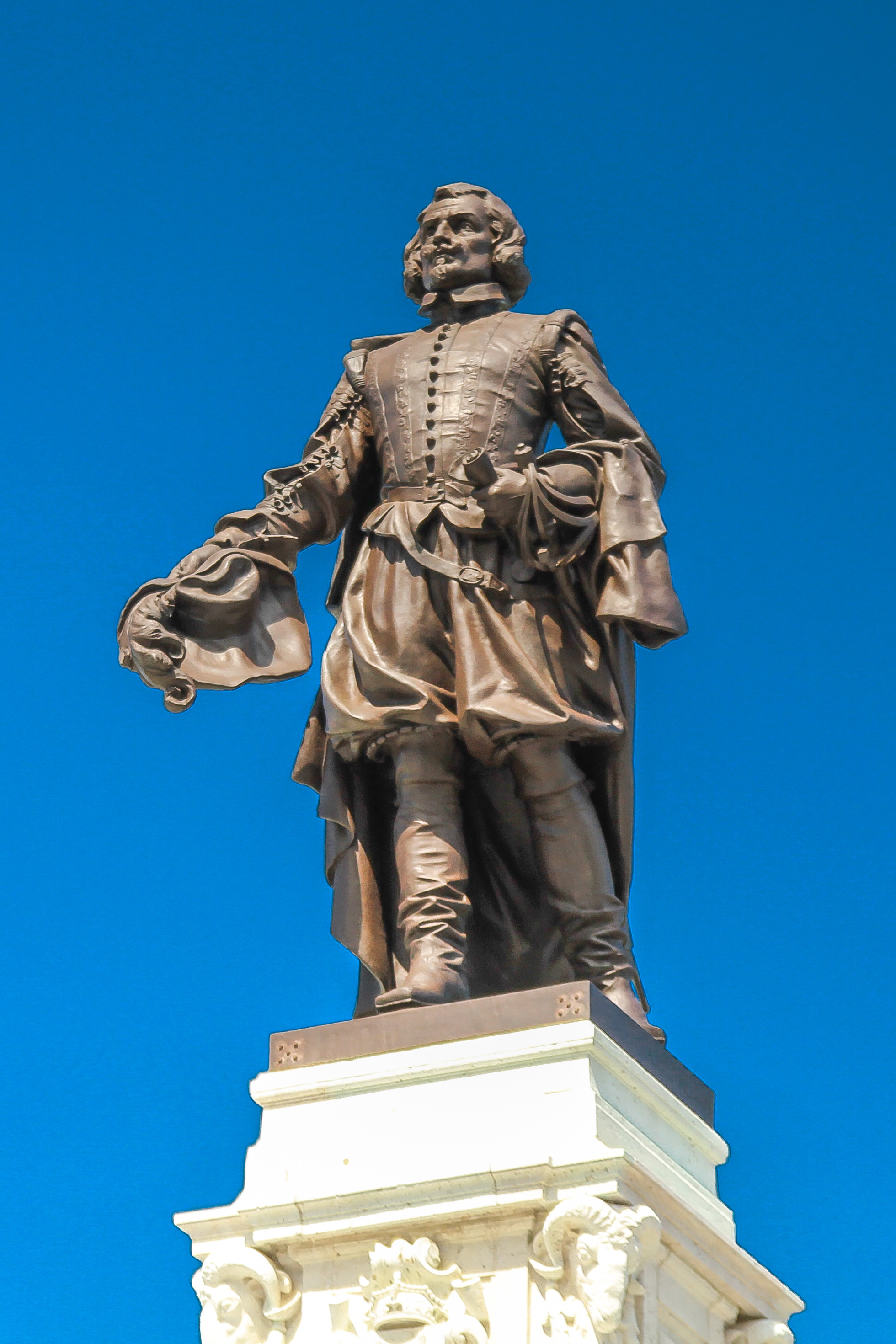 La statue de Samuel-de-Champlain à Québec